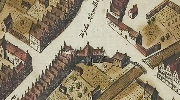 Uitsnede van de Hanenburg stins